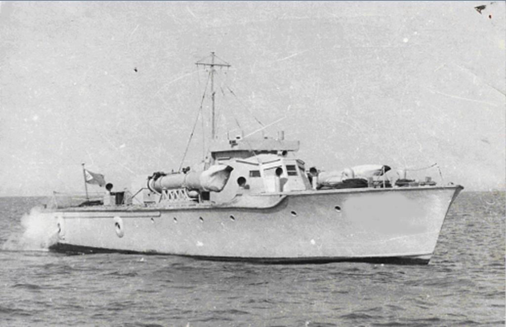 טרפדת בריטית תוצרת חברת ווספר-תורניקרופט.